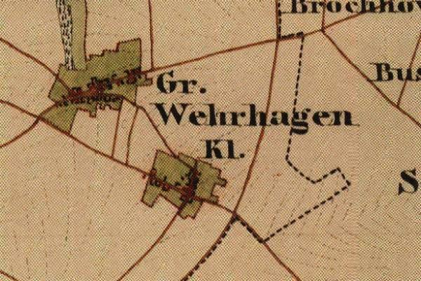 Preußische Kartenaufnahme 1846 - Uraufnahme